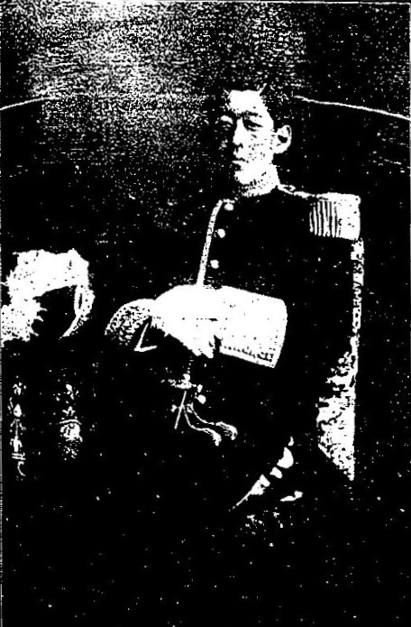 安藤直雄男爵（1882～1927）